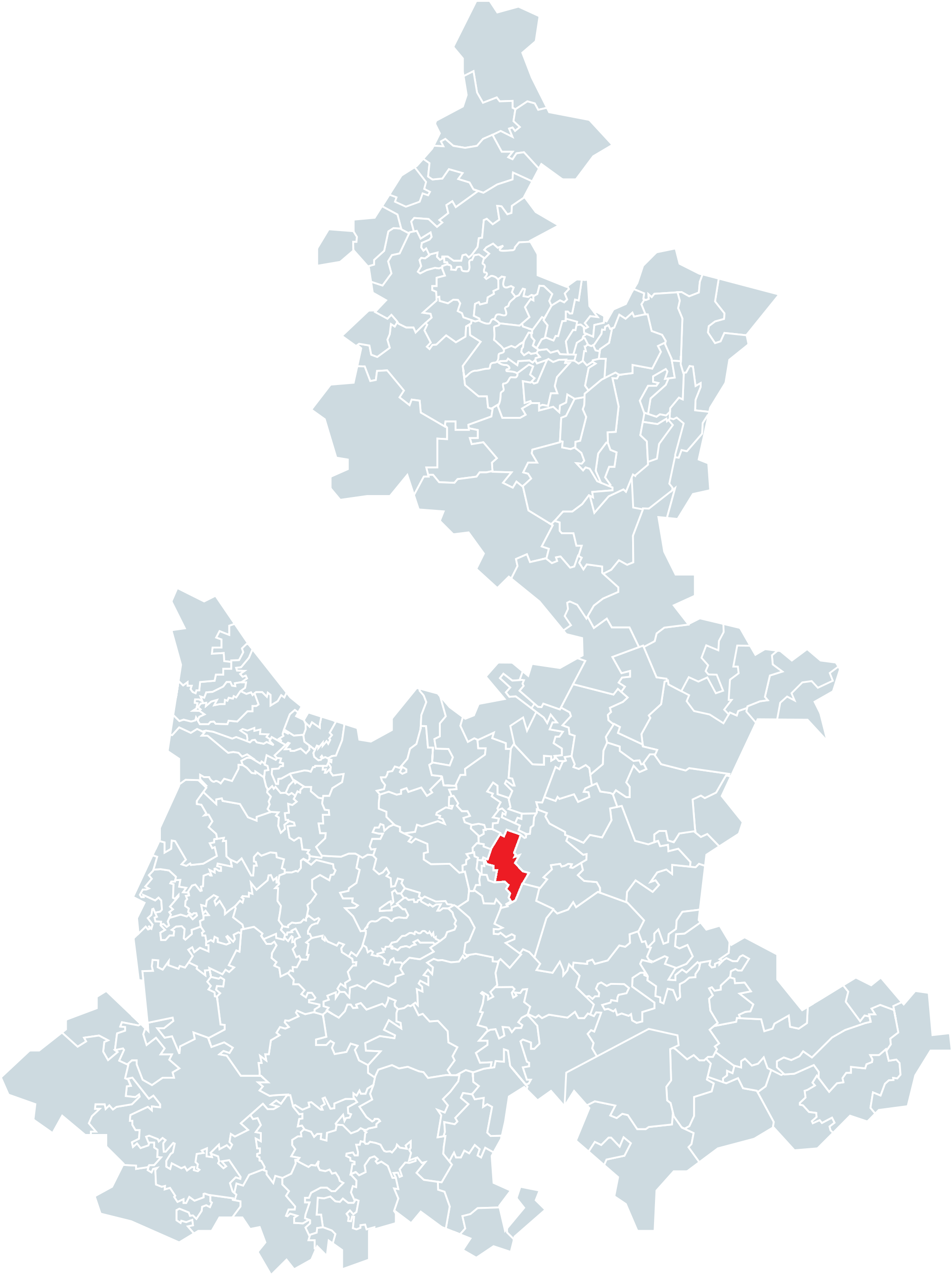 Municipio de Tochtepec